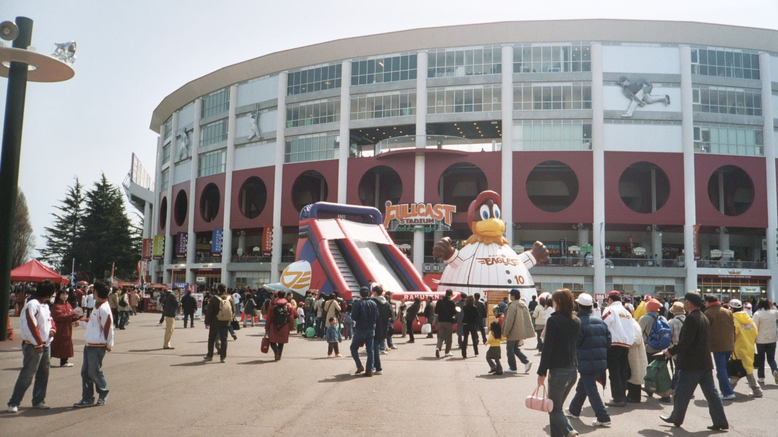 Fullcast Stadium Miyagi.